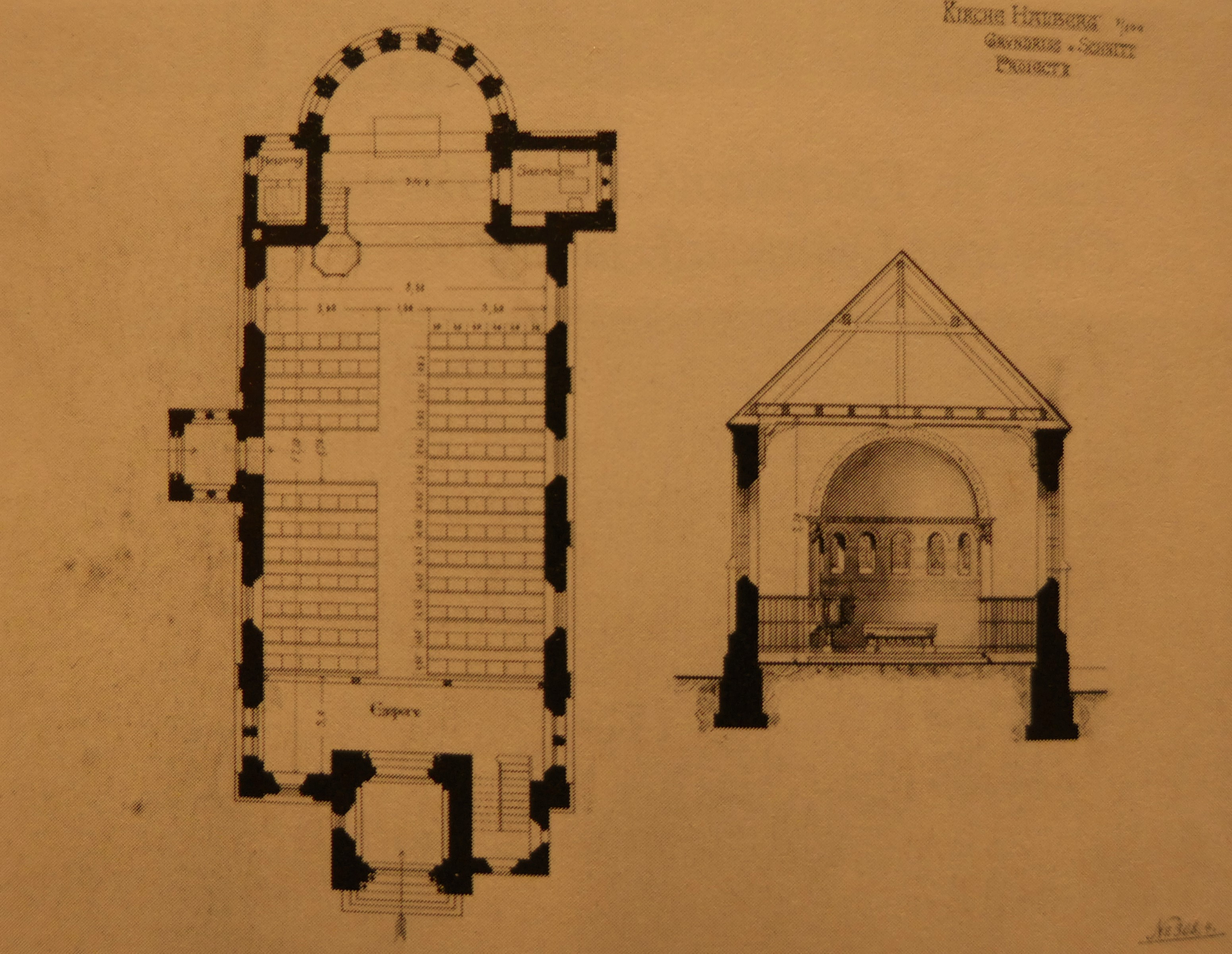 Stumm-Kirche, Neoromanischer Entwurf, Grundriss und Apsis (innen)